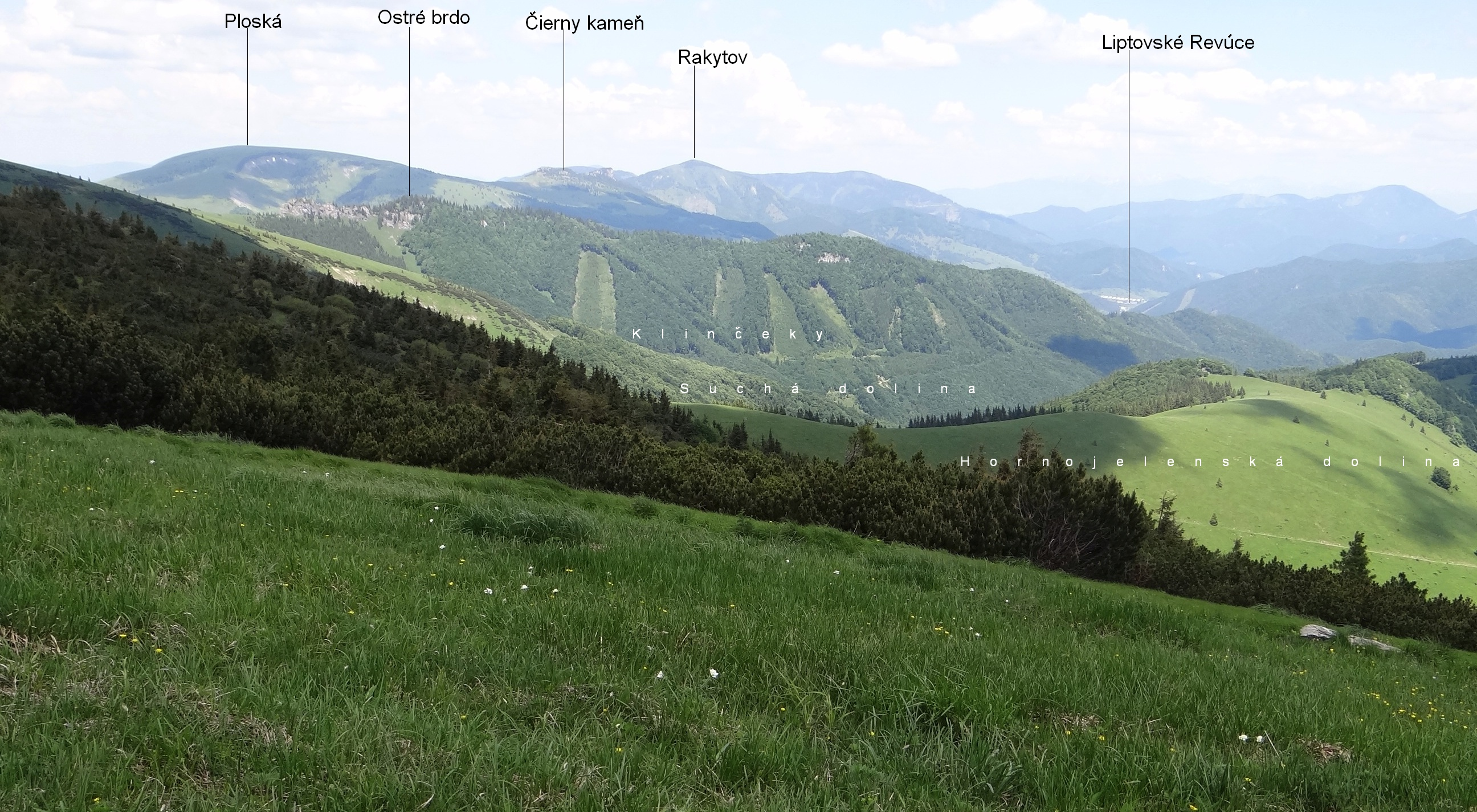 Suchá dolina, Hornojelenská dolina